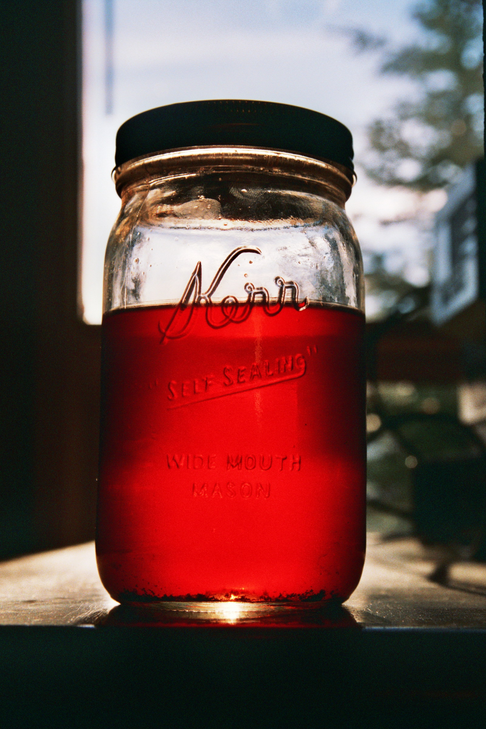 A Kerr mason jar